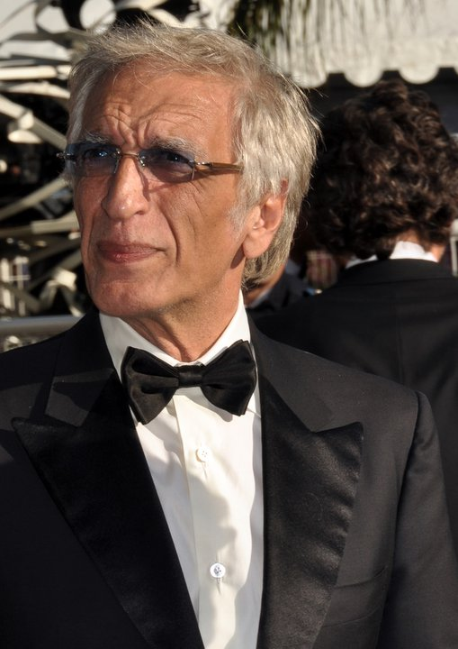 Gérard Darmon au festival de Cannes